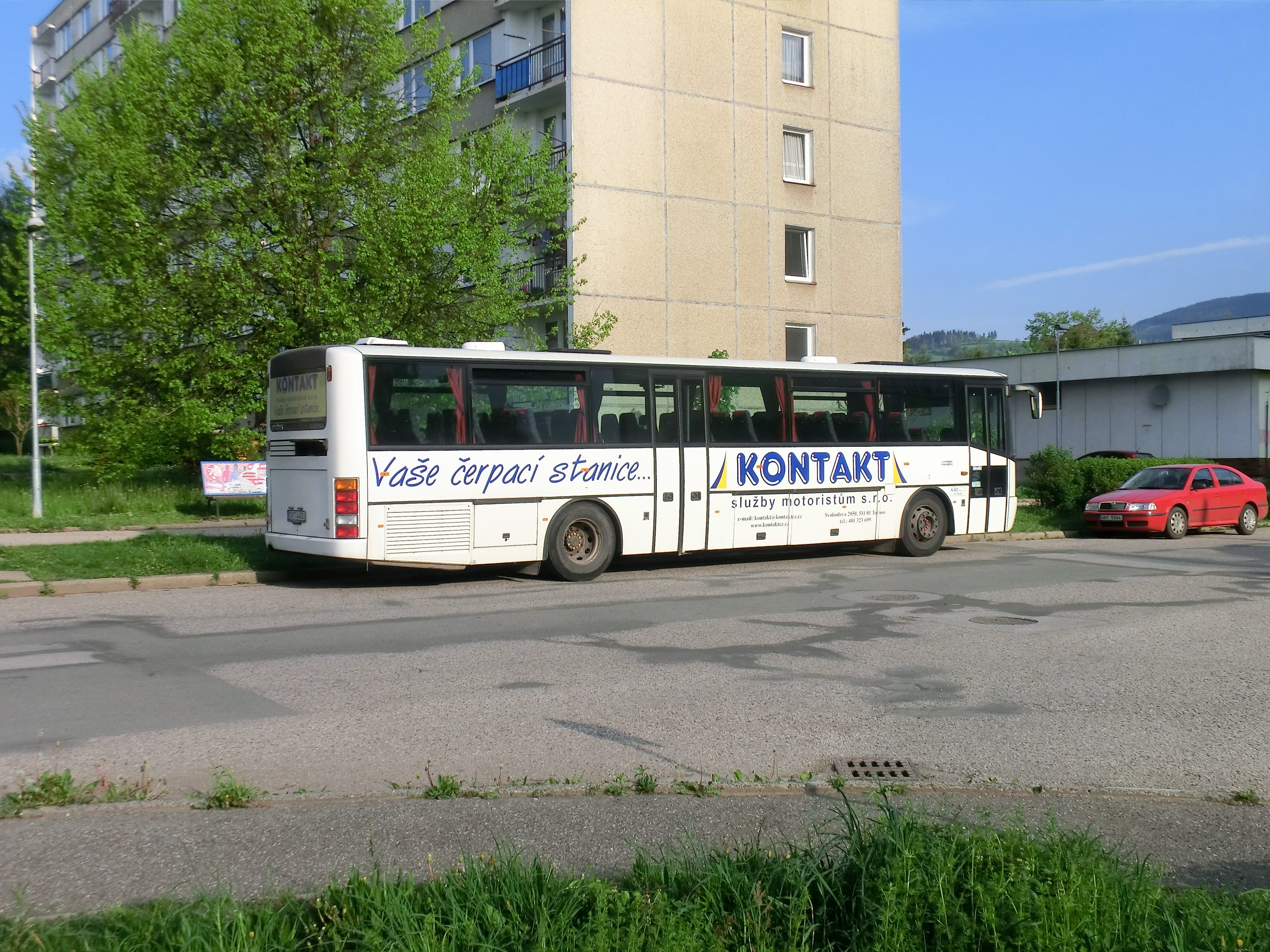 Odstavený bus na Nerudově ulici ve Vrchlabí.